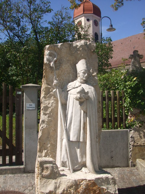 Brunnen mit der Figur des Heiligen Ulrich, Bischofs von Augsburg, geschaffen von dem Bildhauer Ulrich Brendler, Uttenweiler-Sauggart; aufgestellt vor der Pfarrkirche St. Ulrich in Uigendorf, Gemeinde Unlingen